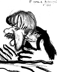 Vladimir Mayakovsky Drawing of Korney Chukovsky